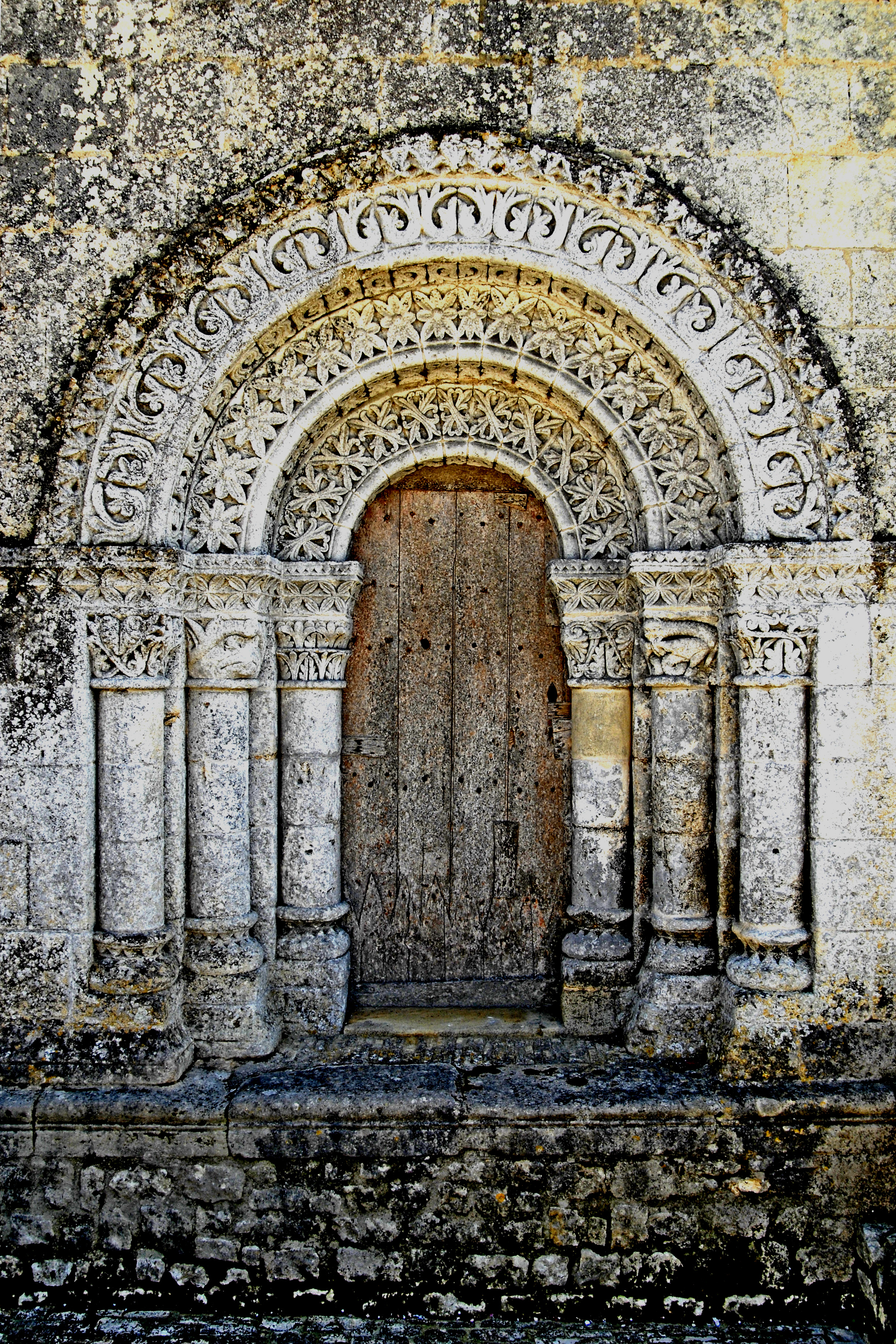 Fenioux, Fassade, Nebenportal, Nordseite